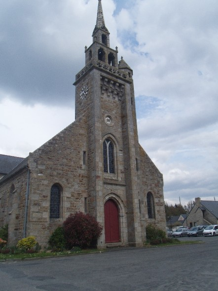 Église Saint-Samson de Trévou-Tréguignec